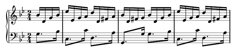 Première ligne du Caprice opus 2 n° 19 de APF Boëly